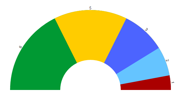 6. Vlada Federacije Bosne i Hercegovine: Stranka demokratske akcije (6) Stranka za Bosnu i Hercegovinu (5) Hrvatska demokratska zajednica (3) Hrvatska demokratska zajednica 1990 (2) Savez nezavisnih socijaldemokrata (1)